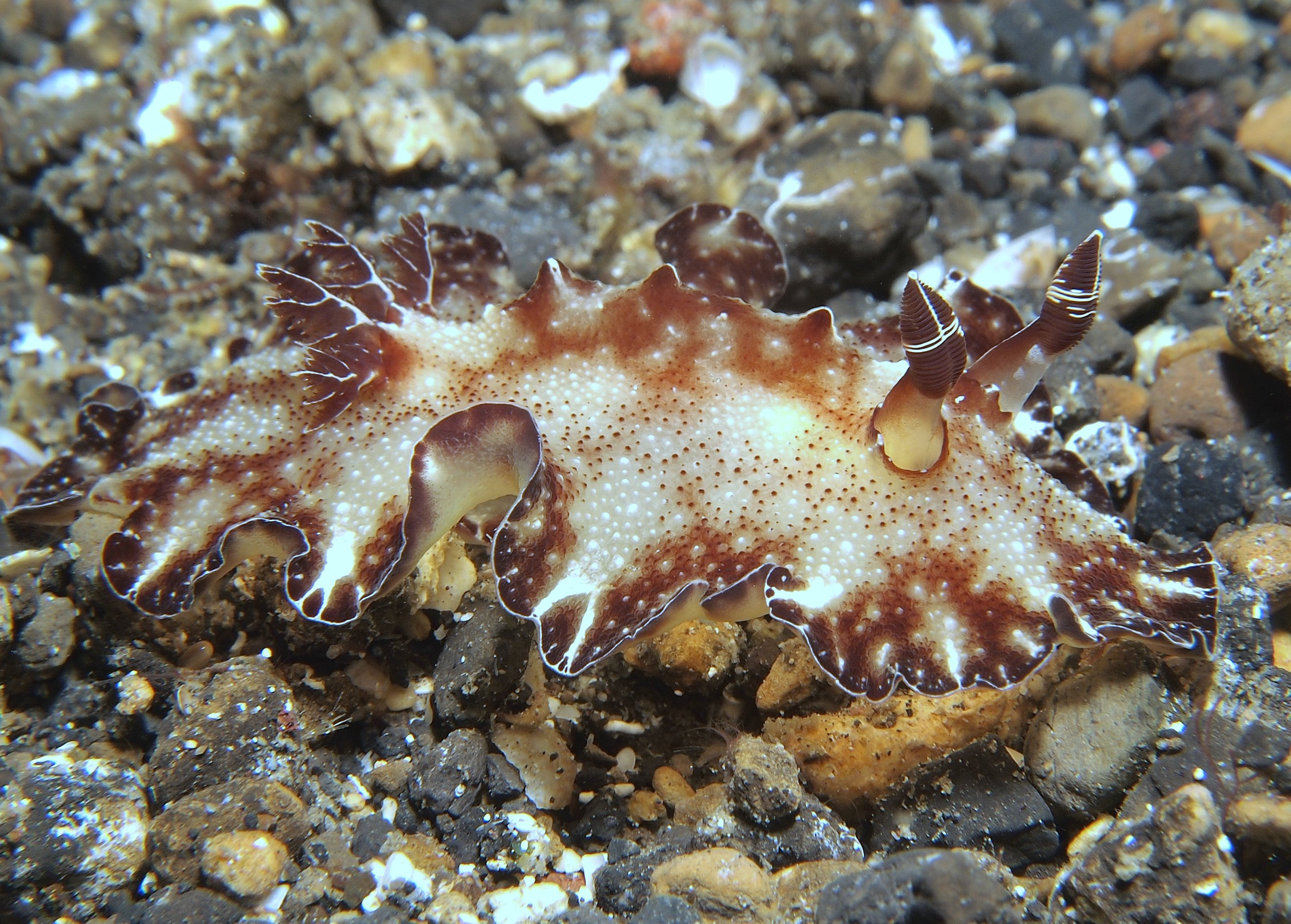 Discodoris_boholensis